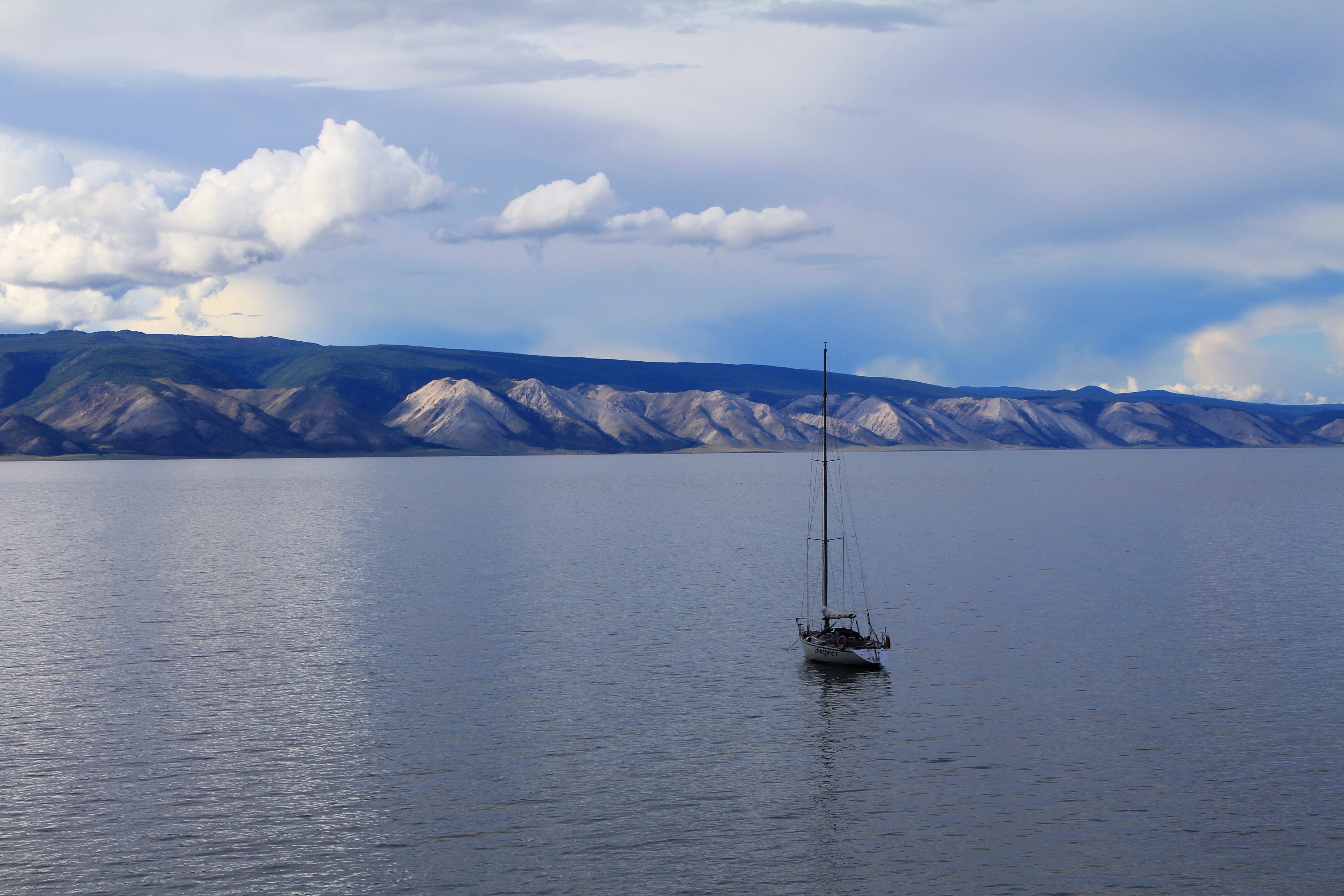 Мыс Бурхан (Скала Шаманка): о. Ольхон Прибайкальский национальный парк Поселок Хужир (координаты N 53 12 234 E 107 20 328), Ольхонский район, Иркутская область This image is related to the protected area of Russia number 3810274